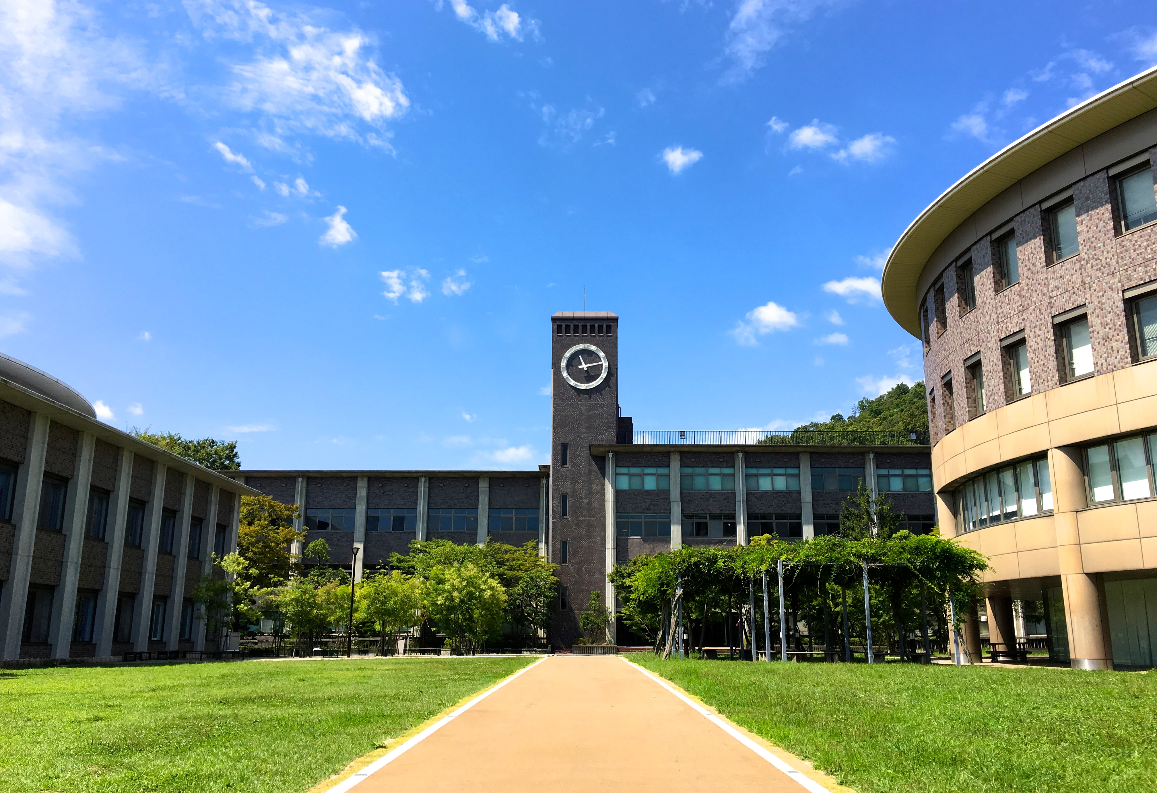 The photo was taken by me at Kinugasa Campus of Ritsumeikan University in Kyoto, Japan, on September 10, 2016.